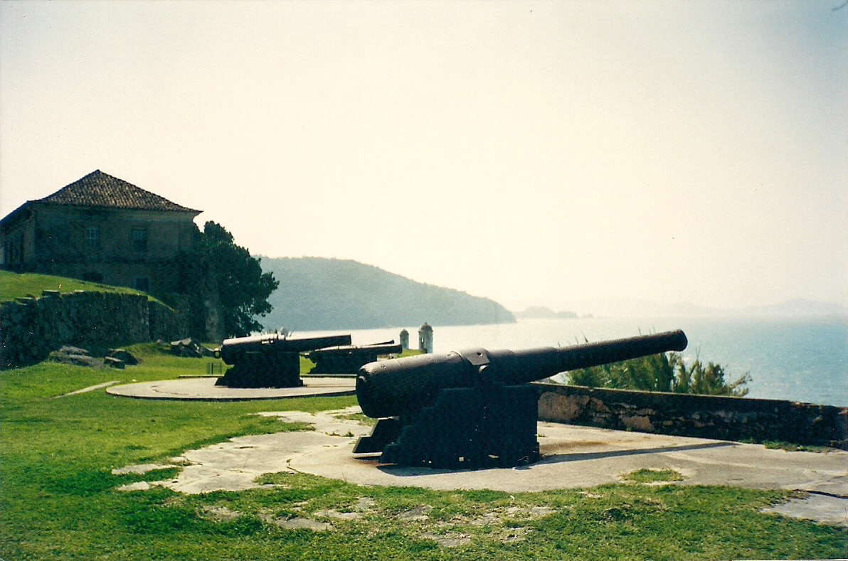 Fortaleza de Santa Cruz de Anhatomirim, ilha de Anhatomirim, SC, Brasil: aspecto da artilharia.